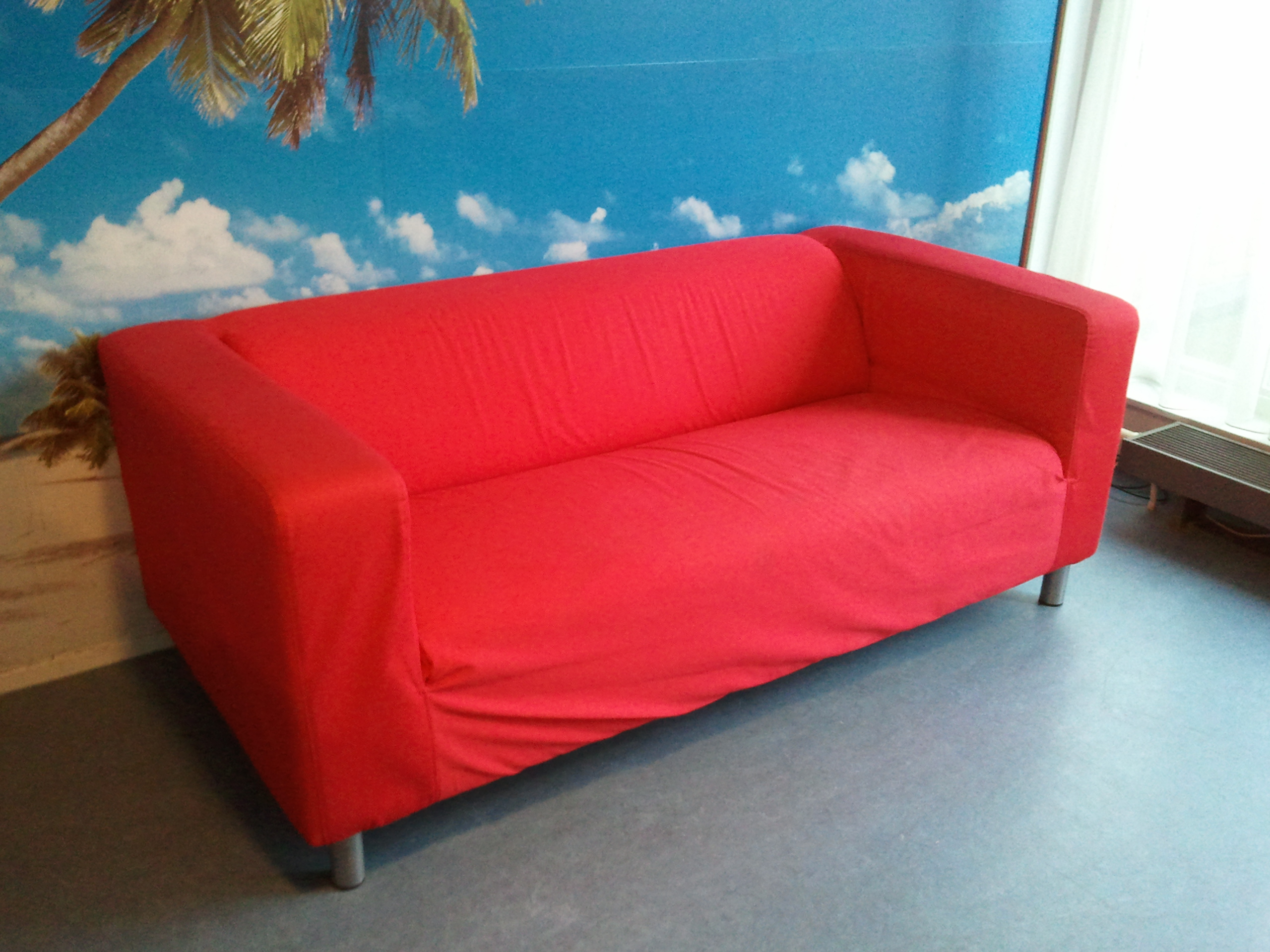 En rød utgave av Klippan.